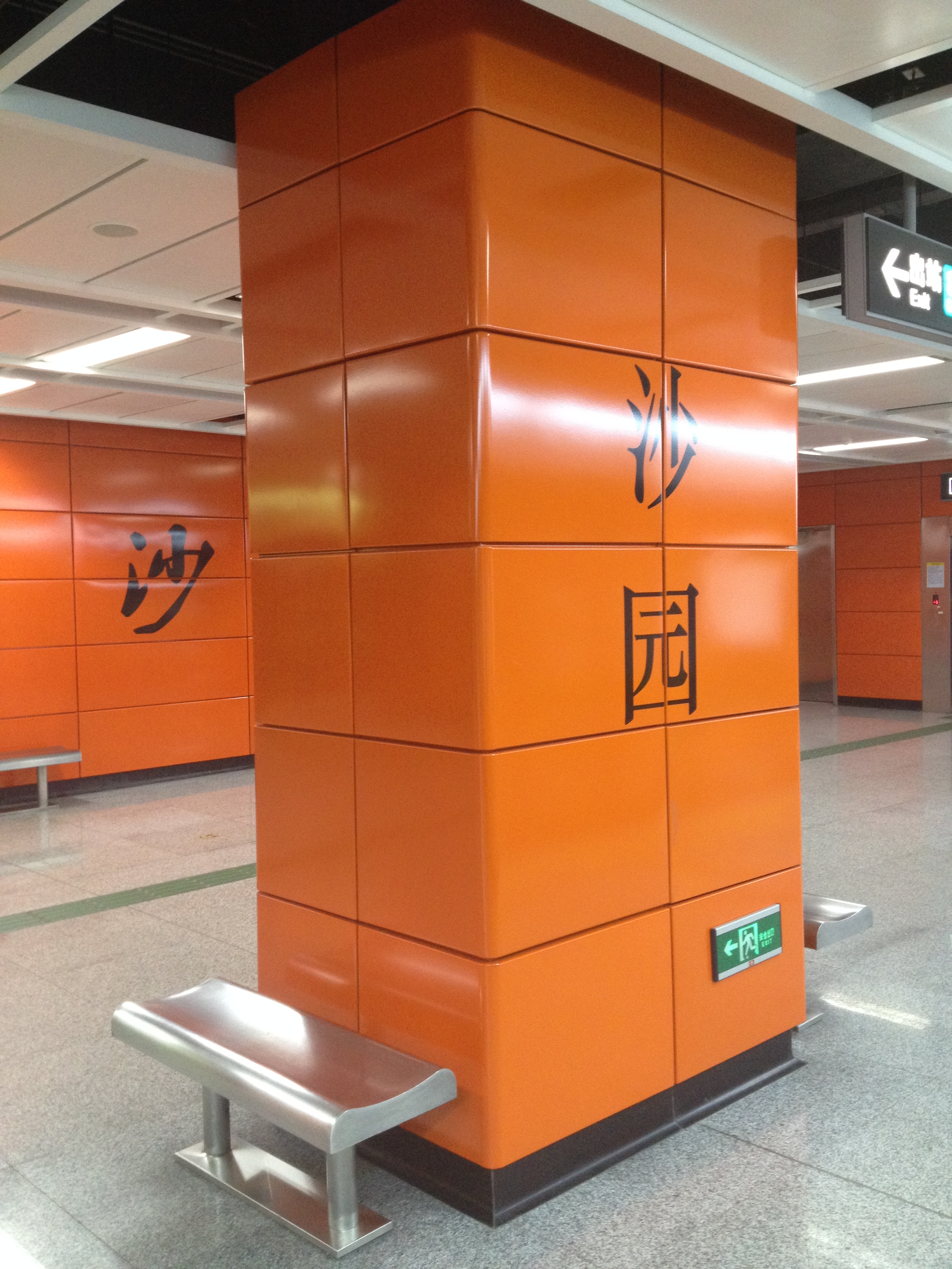 广州地铁沙园站位于柱子上面的站名